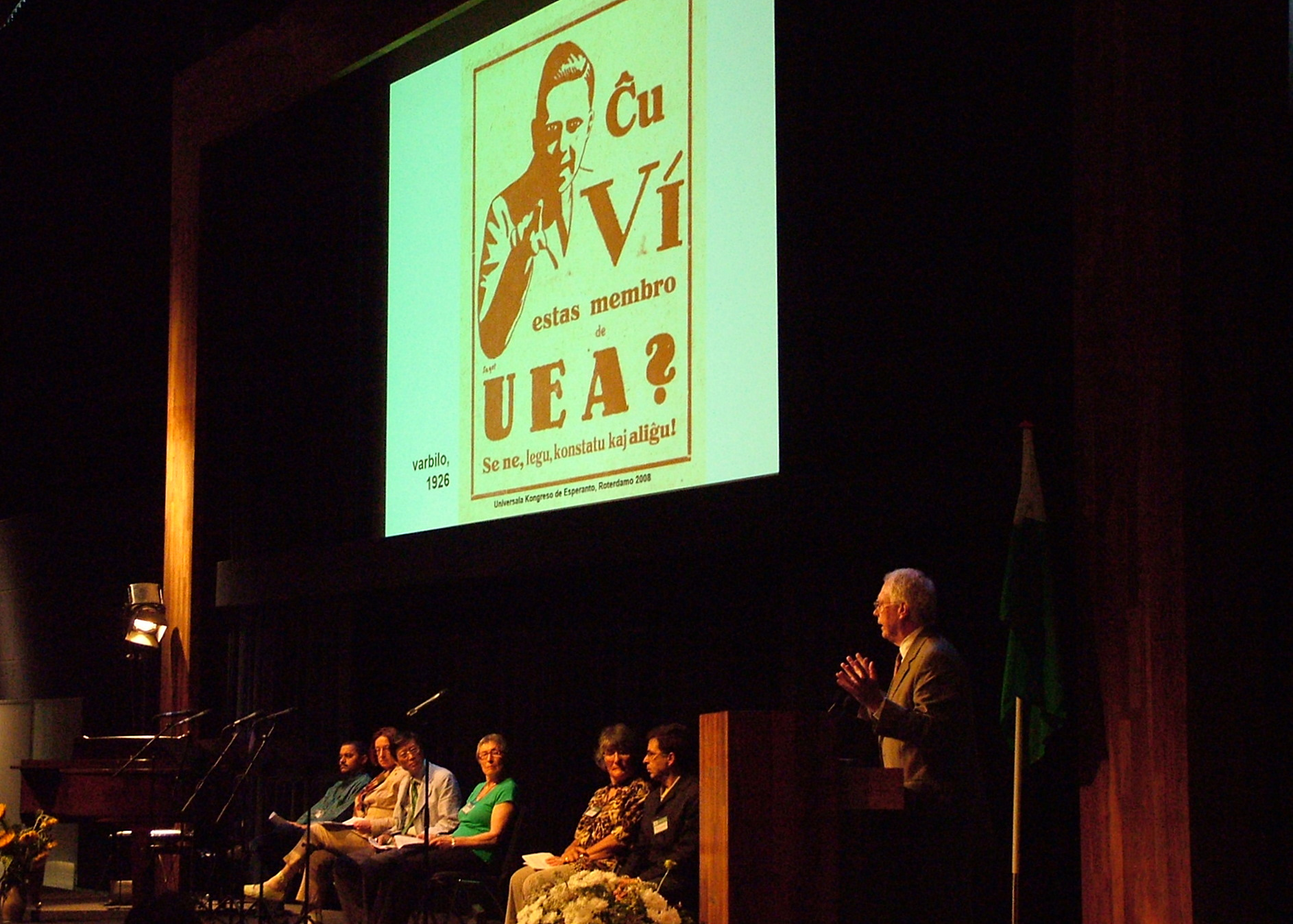 Universala Kongreso de Esperanto, Roterdamo. "UEA centjara", parolas Humphrey Tonkin.